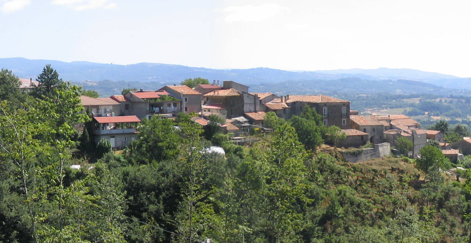 Adami, Panorama